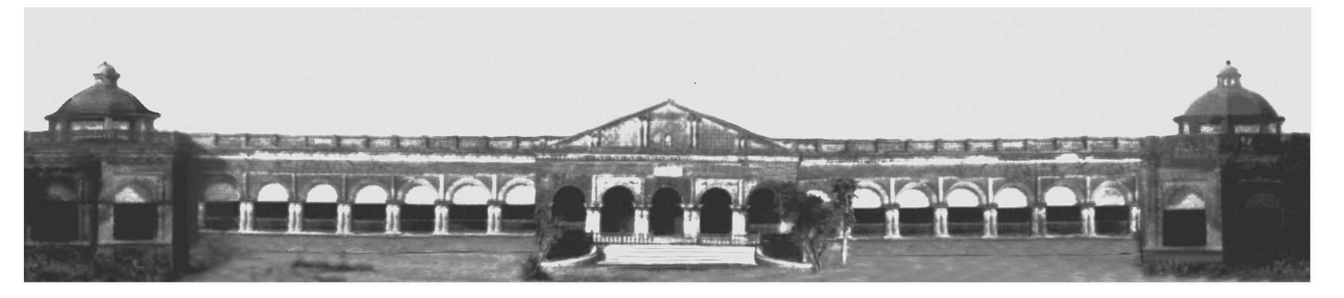 Image of Kala Bhawan Palace at Garh Banaili